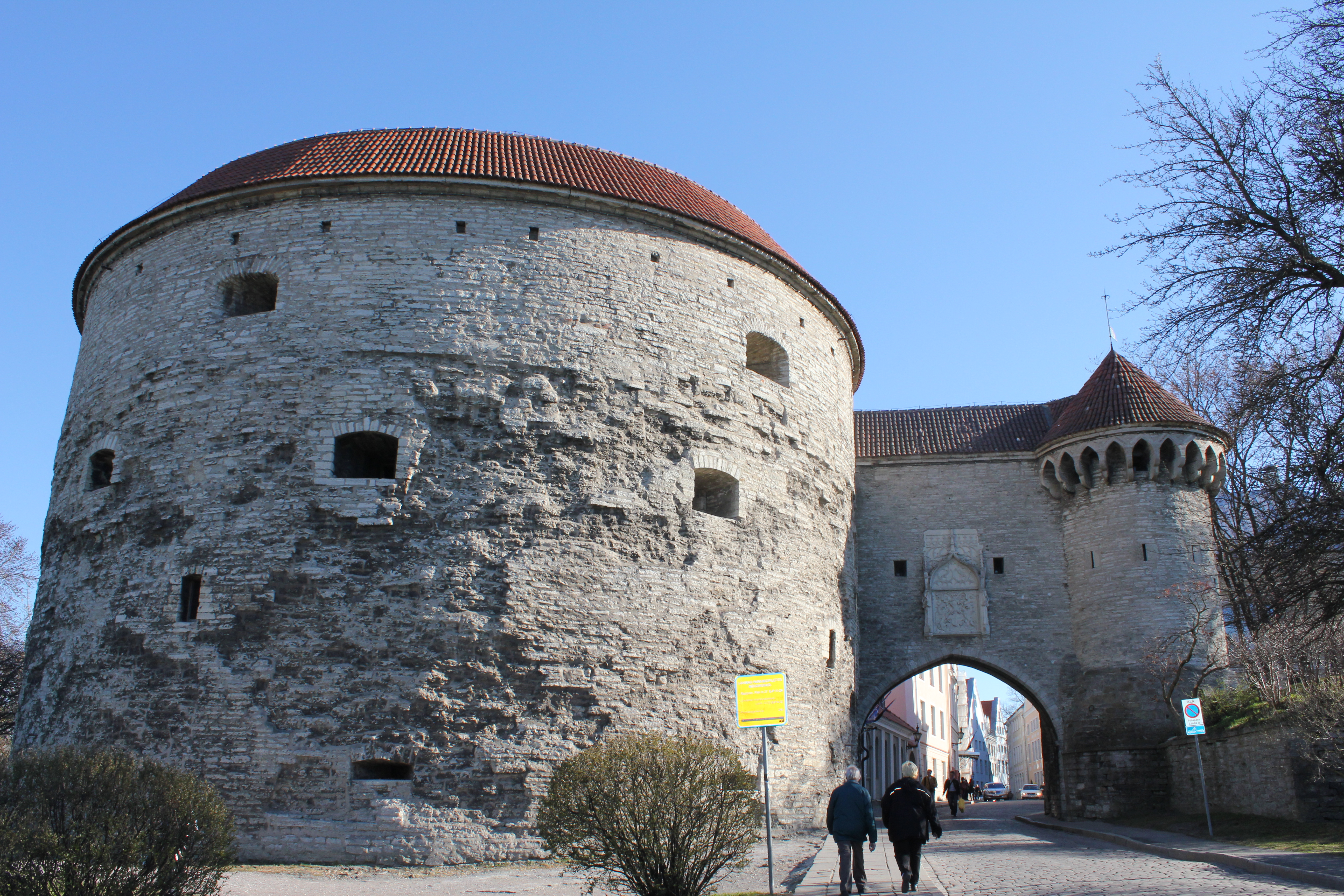 Толстая Маргарет в Таллинне